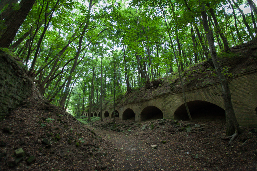 Fort Hahneberg September 2013